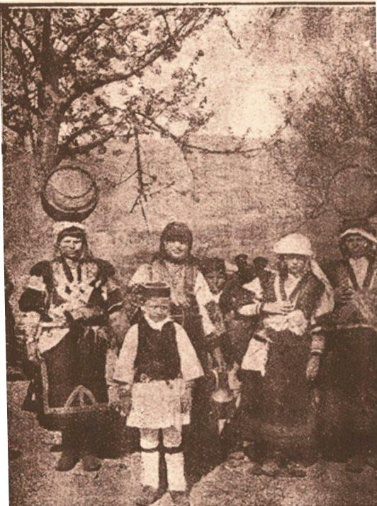 Мариовска носија